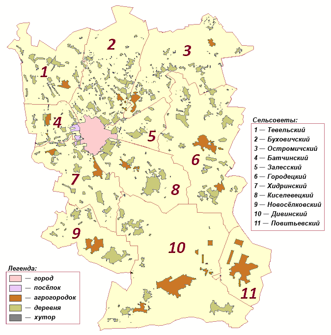 Карта Кобринского района с граница НП и сельсоветов с легендой. Сельсоветы обозначены цифрами. Цвет НП означает его тип (коричневый: агрогородок, зелёный - деревня, фиолетовый - посёлок, розовый - город, чёрный - хутор). Хутор только один (Ор) и его плохо видно (см. на границе Дивинского и Новосёлковского сельсоветов)